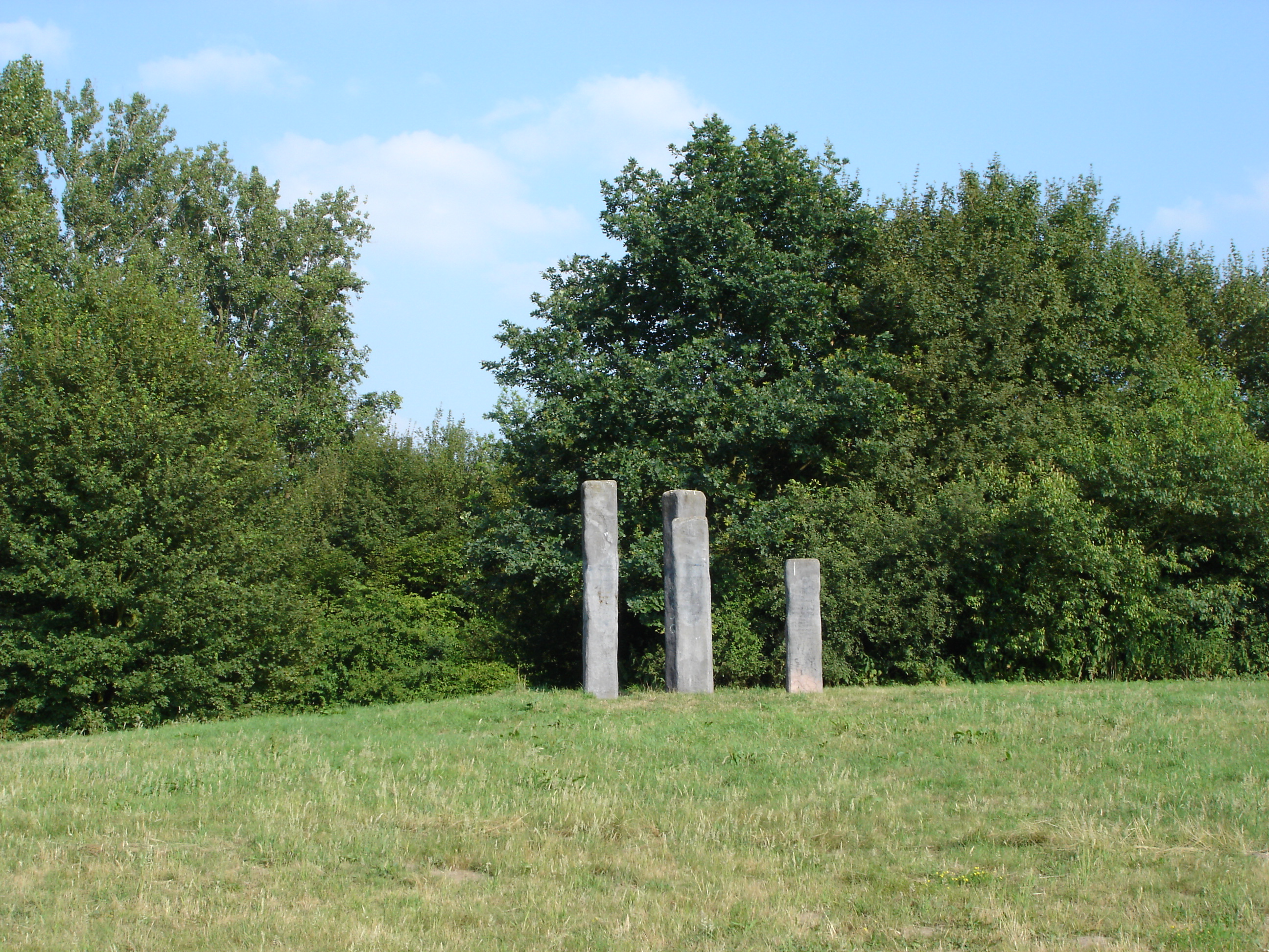 Steinskulptur im Wienburgpark in Münster, Westfalen, Germany